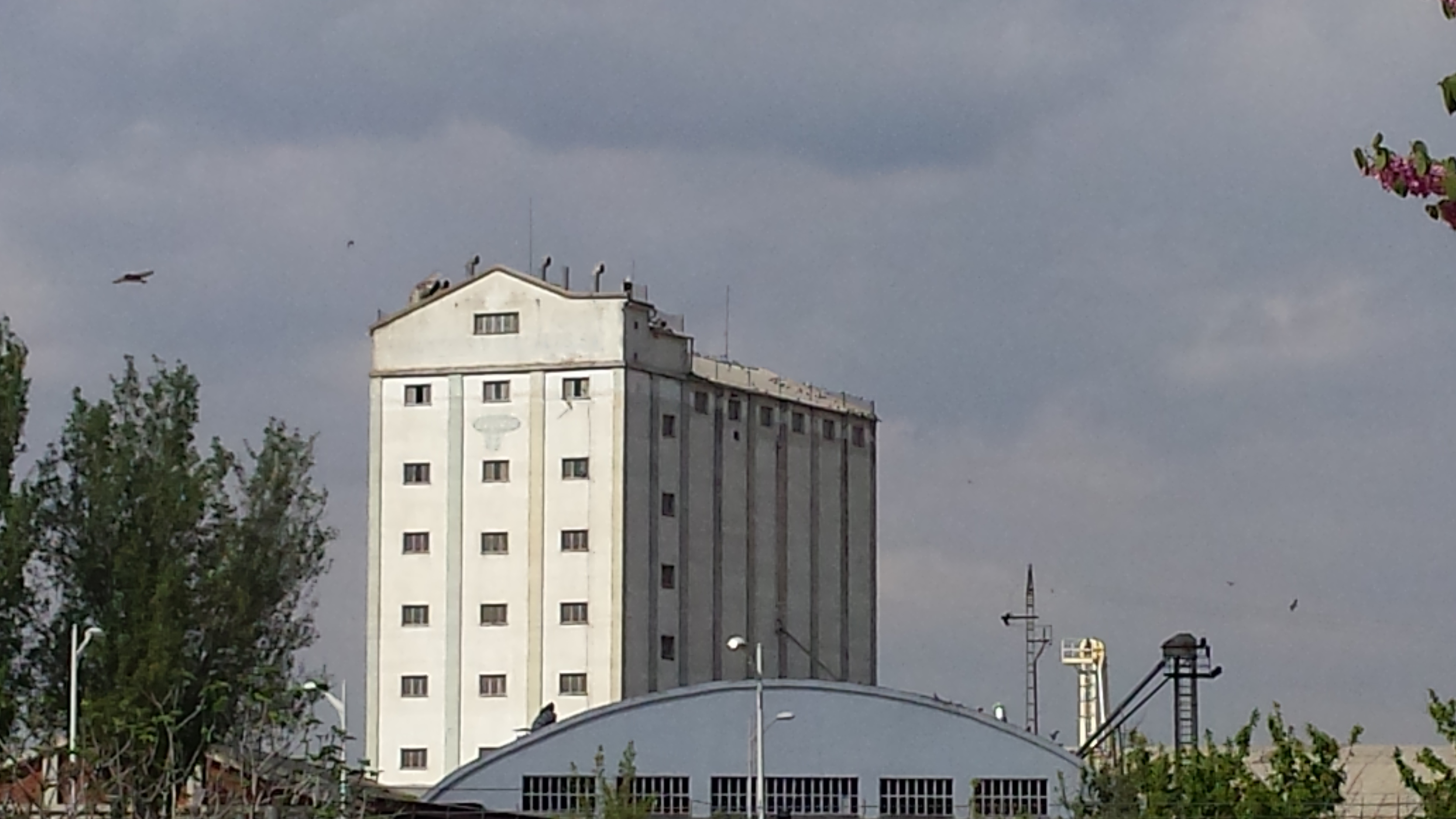 Fábrica Barrio Nuestra Señora de Cubas Albacete